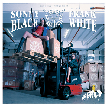 Cover des Albums „Carlo Cokxxx Nutten“